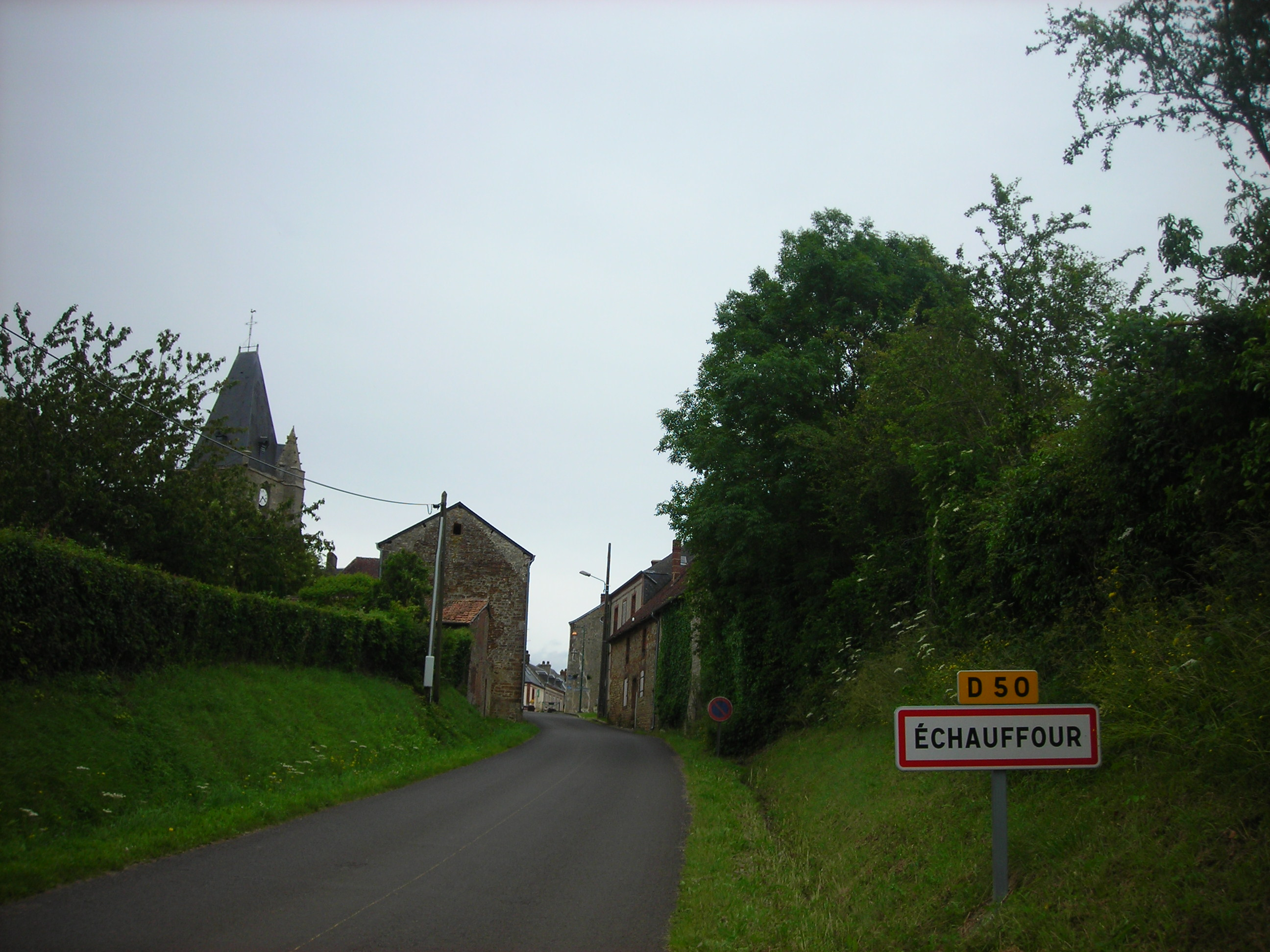 Entrée du village d'Échauffour (Orne, France)